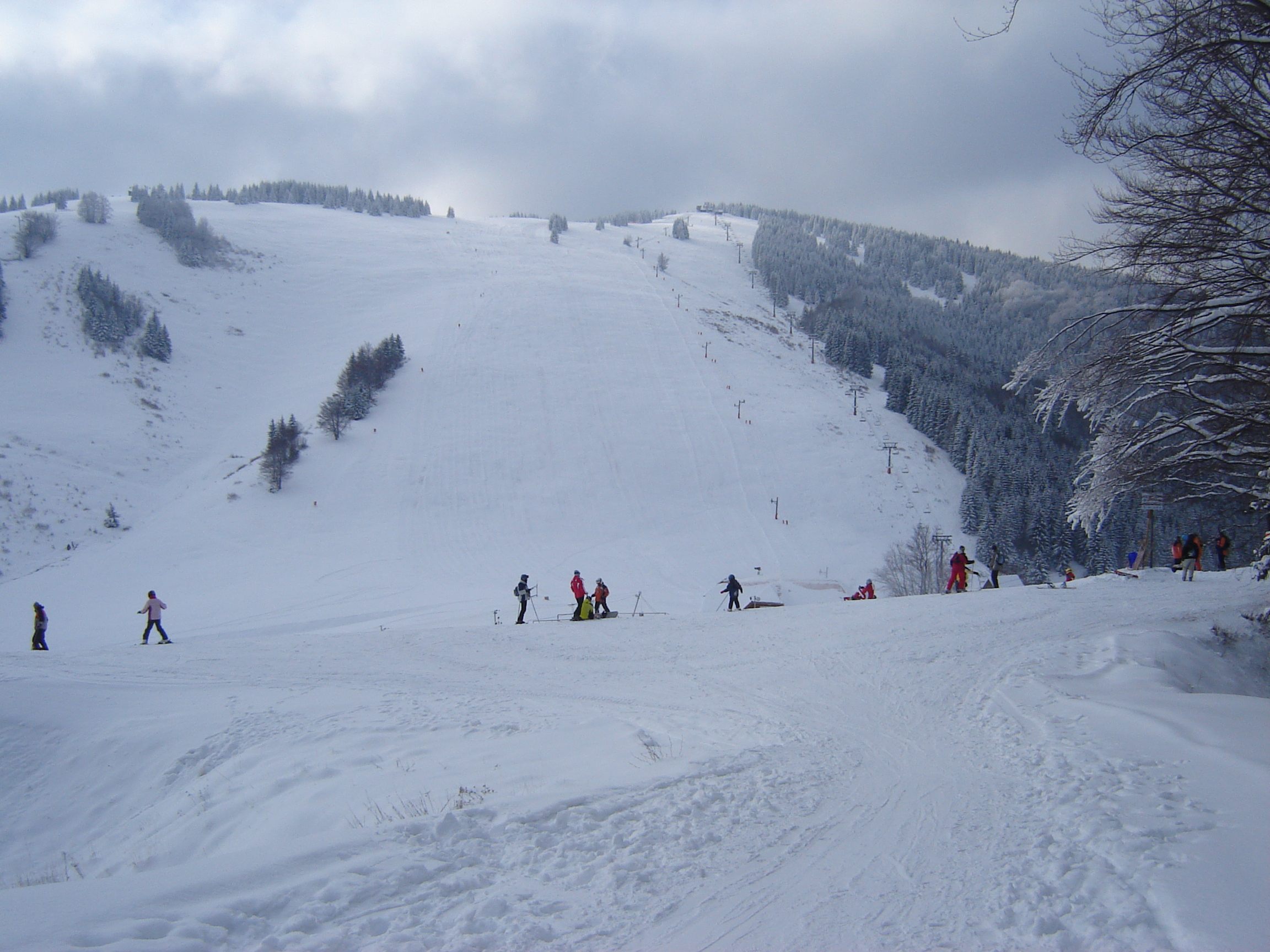 Malinô - Brdo: hlavný svah